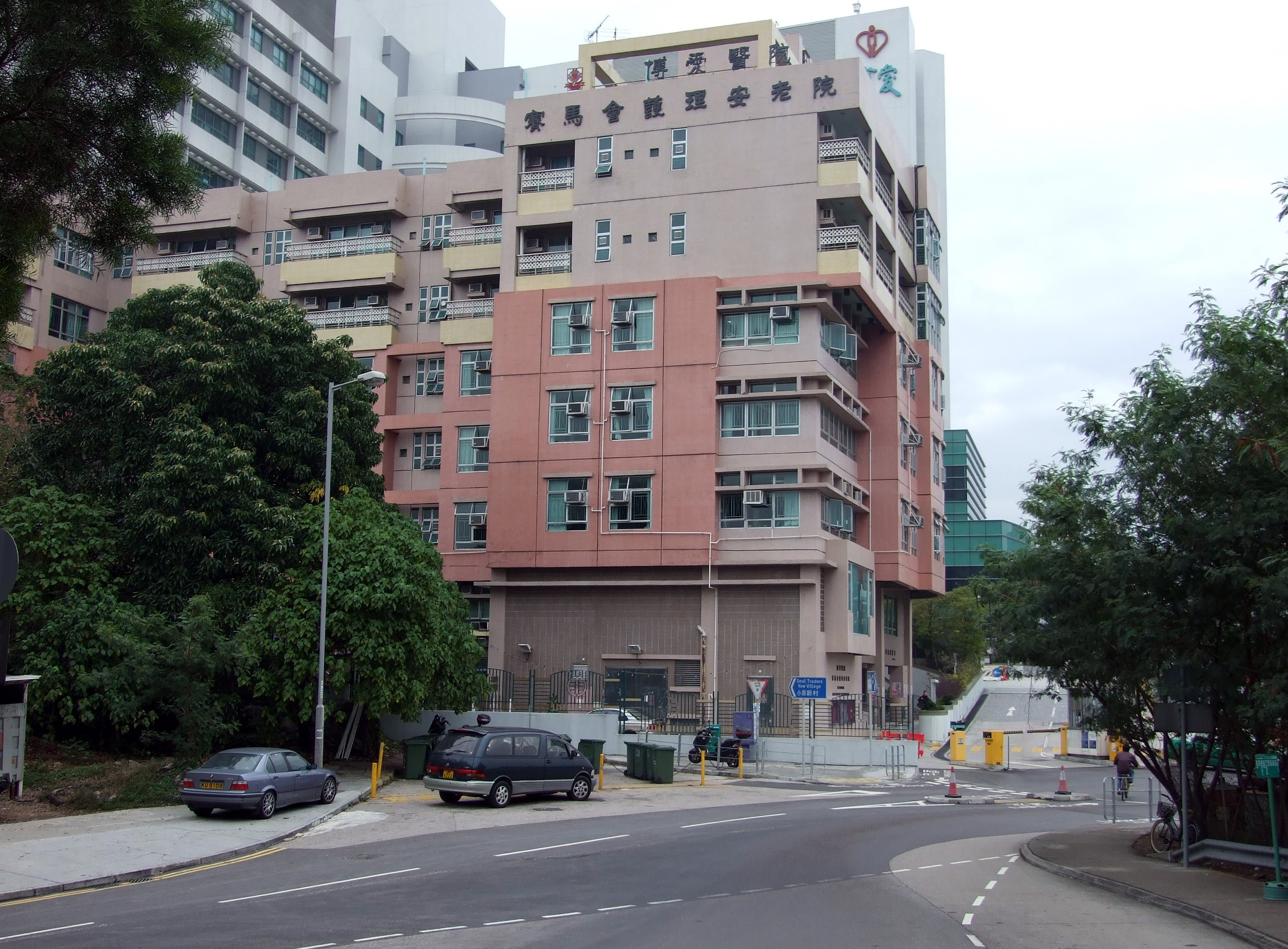 中文（香港）: 博愛醫院賽馬會護理安老院